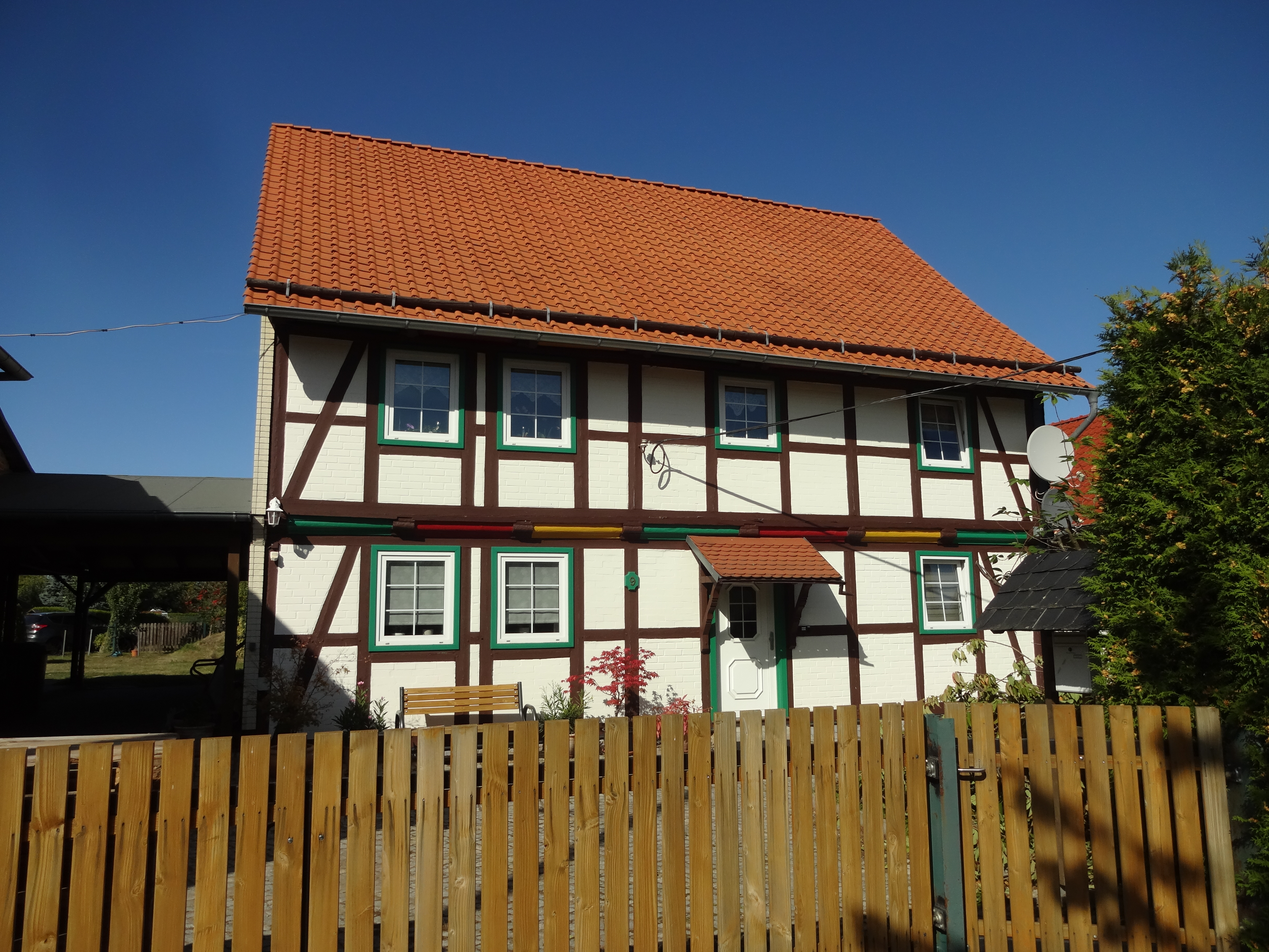 denkmalgeschütztes Wohnhaus in der Backhausgasse 9 in Drübeck